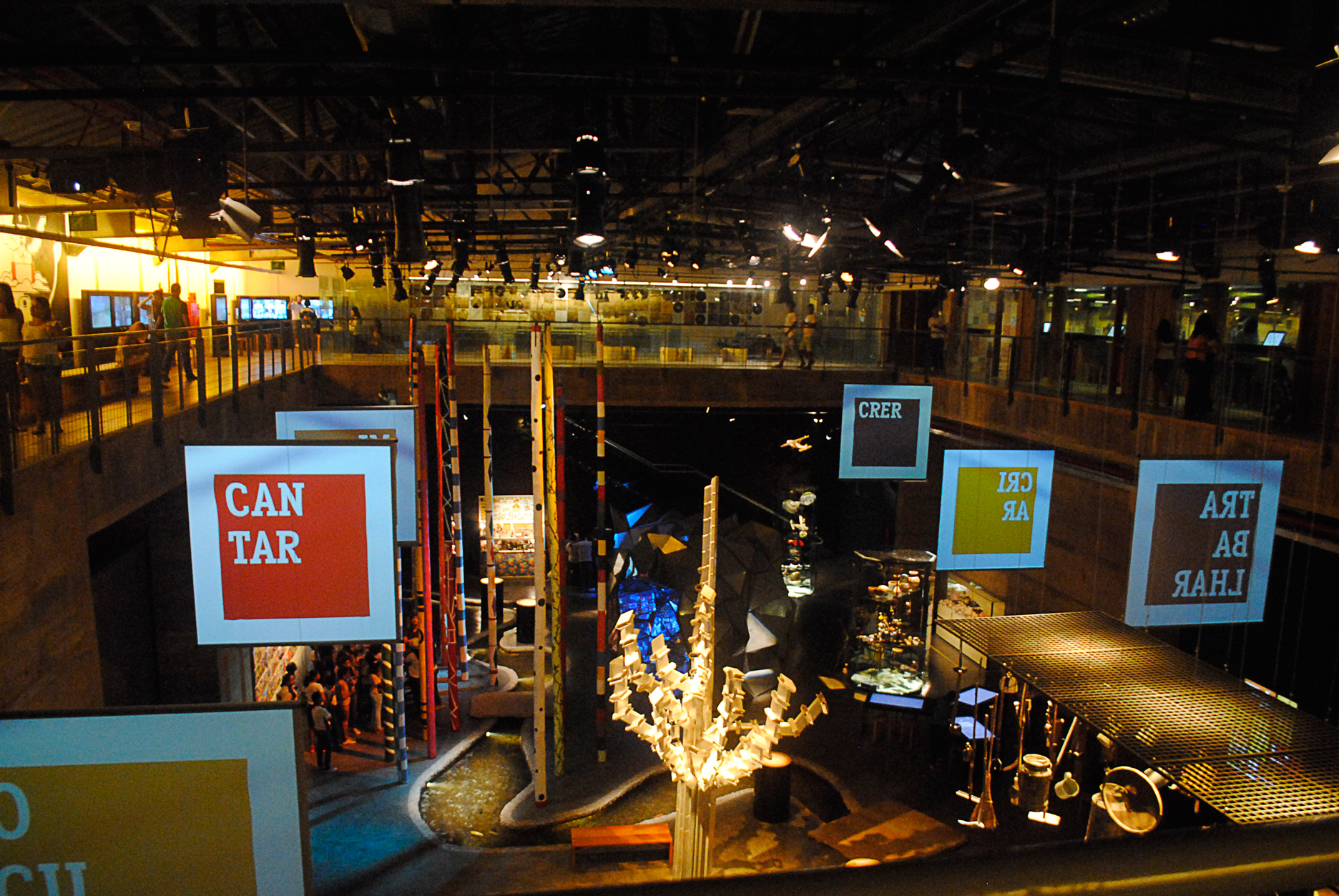 Museu Cais do Sertão - Recife, Pernambuco, Brasil